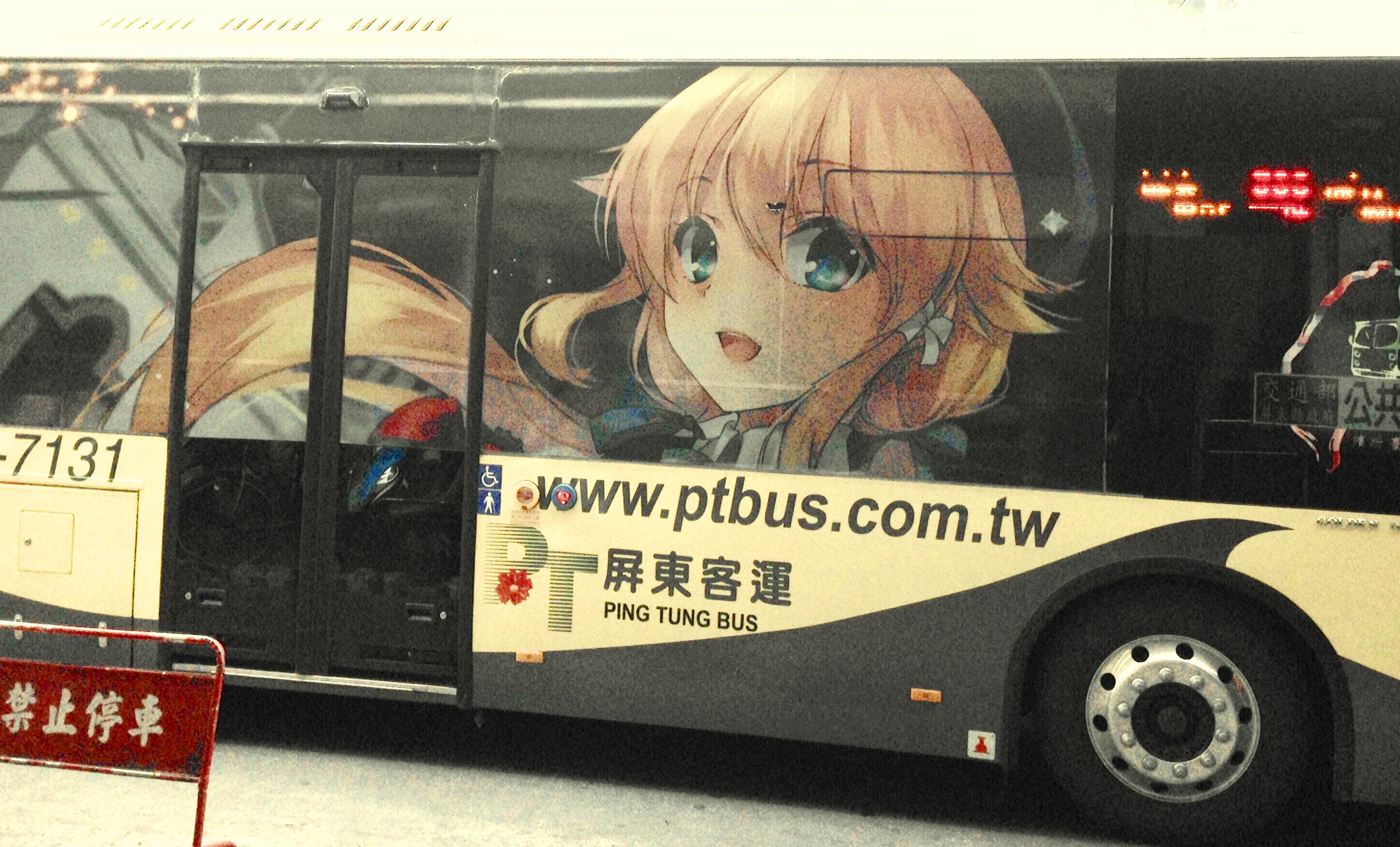 中文（台灣）: 屏東客運低底盤公車右側車身上的迷路小瑪。